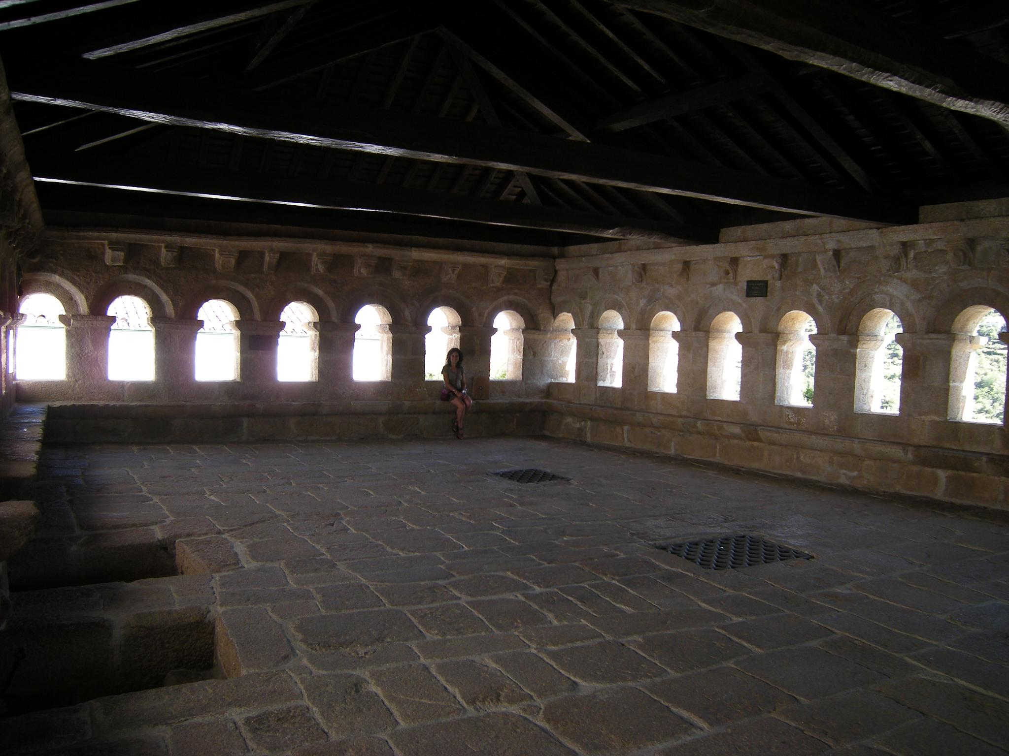 Domus municipalis de Bragança